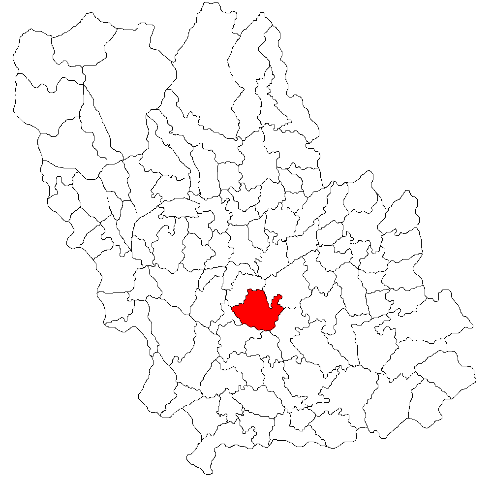 Categorie:Hărţi ale judeţului Prahova